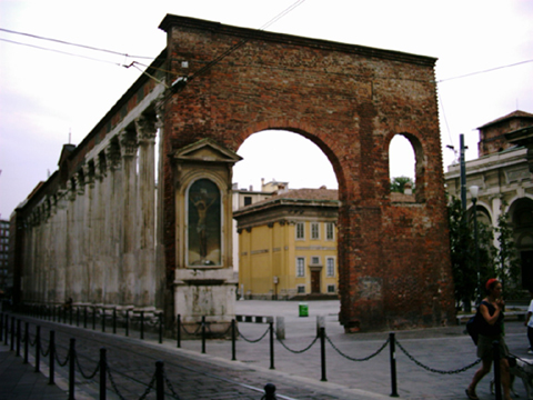 Colonne di San Lorenzo a Milano Dichiaro di aver personalmente fotografato questo monumento e di essere il proprietario del copyright di questa immagine che dono a Wikipedia. Aanto 10:41, Set 15, 2004 (UTC)